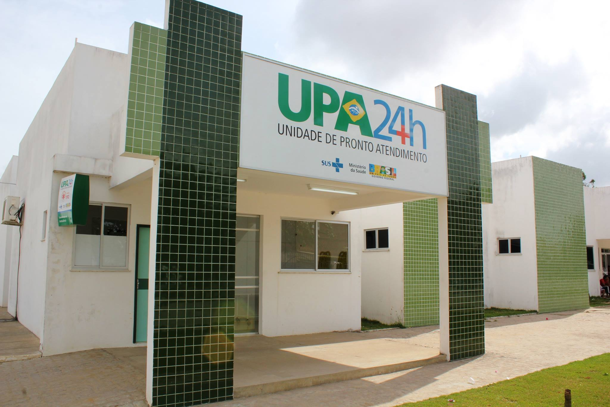 UPA de Cruz das Almas